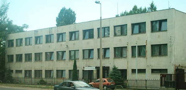 A Luther Márton Szakkollégium épülete (Budapest, XIII. ker)